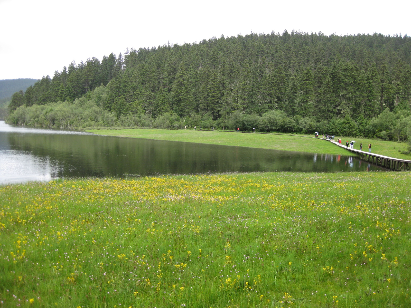 香格里拉属都湖